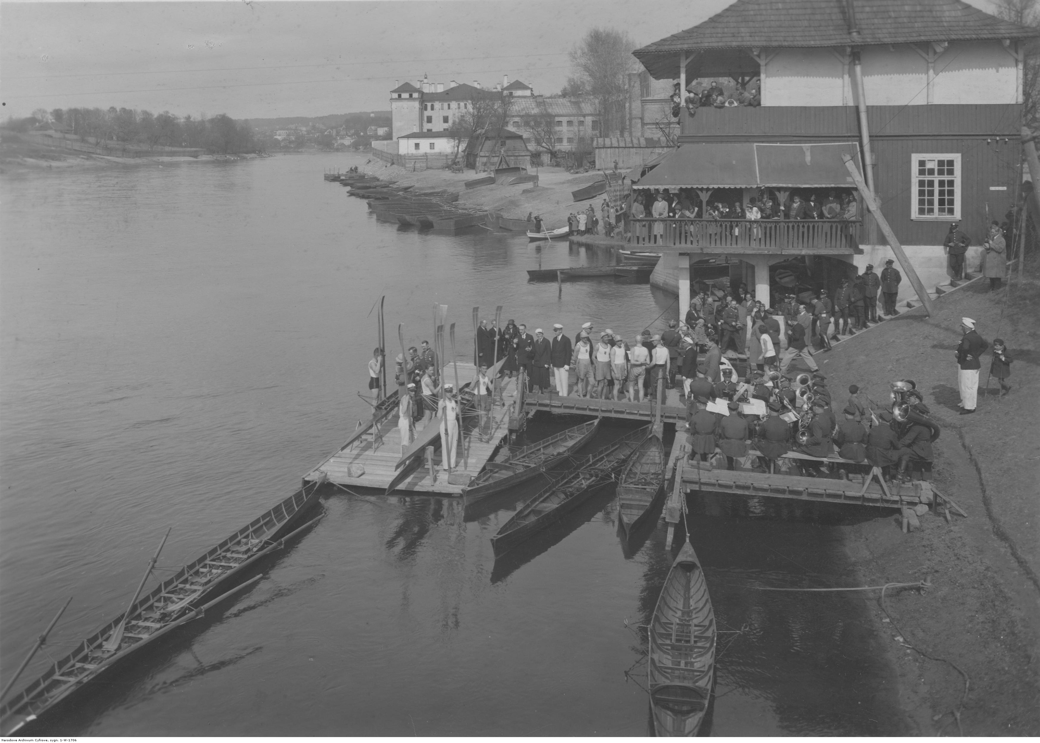 Otwarcie sezonu wioślarskiego na przystani 3 Batalionu Saperów w Wilnie. Uczestnicy uroczystości na przystani na brzegu Wilii. Z prawej widoczna orkiestra wojskowa. W głębi więzienie wojskowe - dawny Pałac Służków. Koncern Ilustrowany Kurier Codzienny - Archiwum Ilustracji. Sygnatura: 1-W-1706